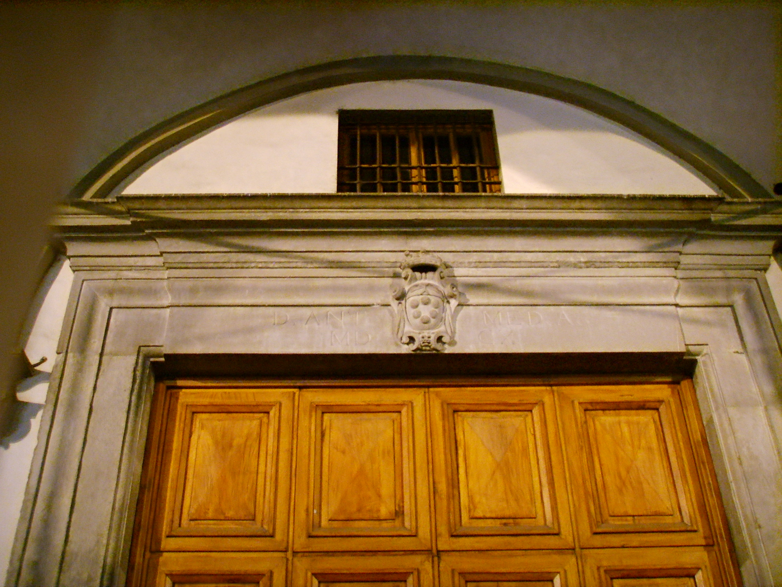 Loggia_dei_Tessitori,_interno in Florence